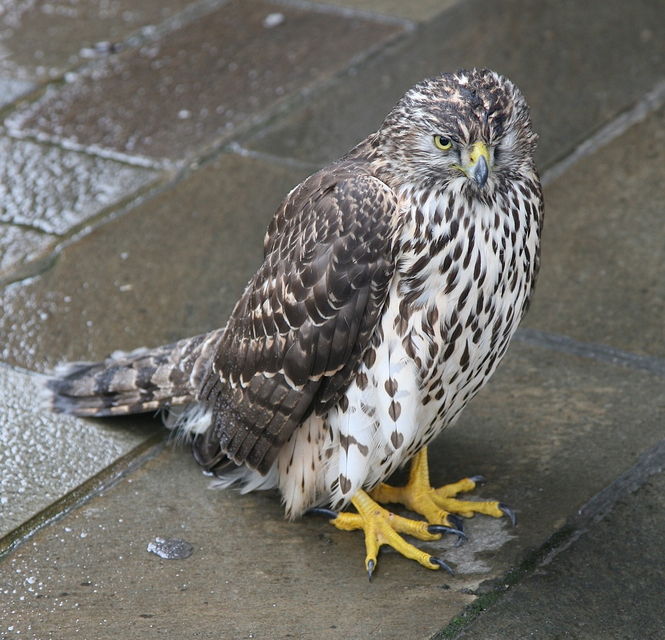 Hønsehauk